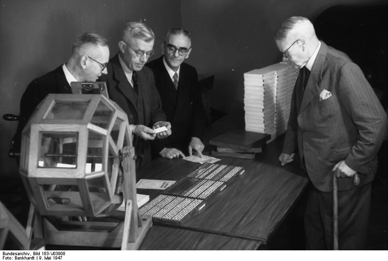 Foto: Bankhardt (SNB) Die Berliner Stadtlotterie. Auf dem Bild: Die Holzkästen mit den Gewinnen. Ein Aufsichtsbeamter bei Stichproben. Aufgenommen: Berlin. Herausgegeben: Informationabüro SMAD. Berlin, den 9.5.1947